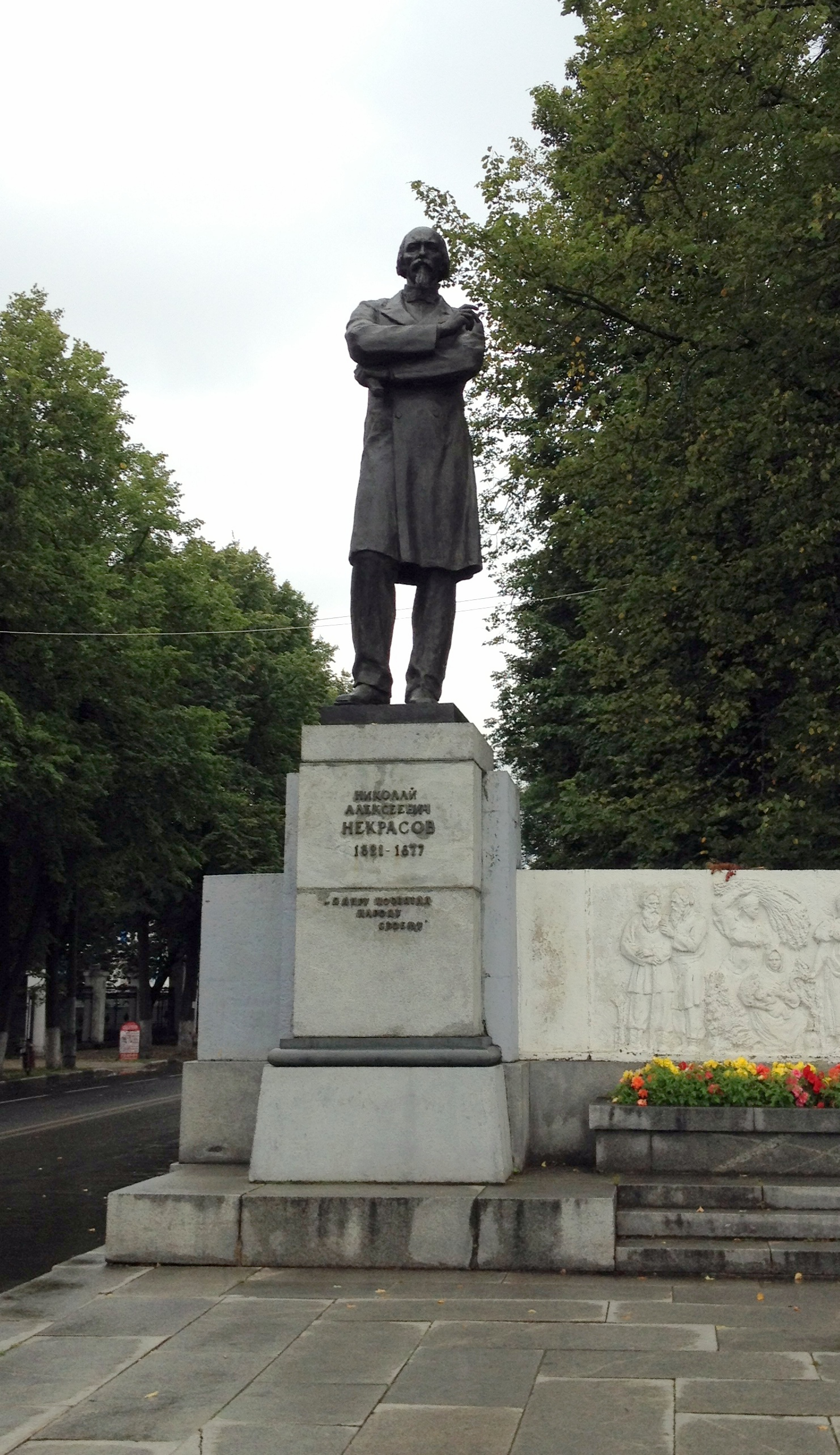 памятник Некрасову в Ярославле